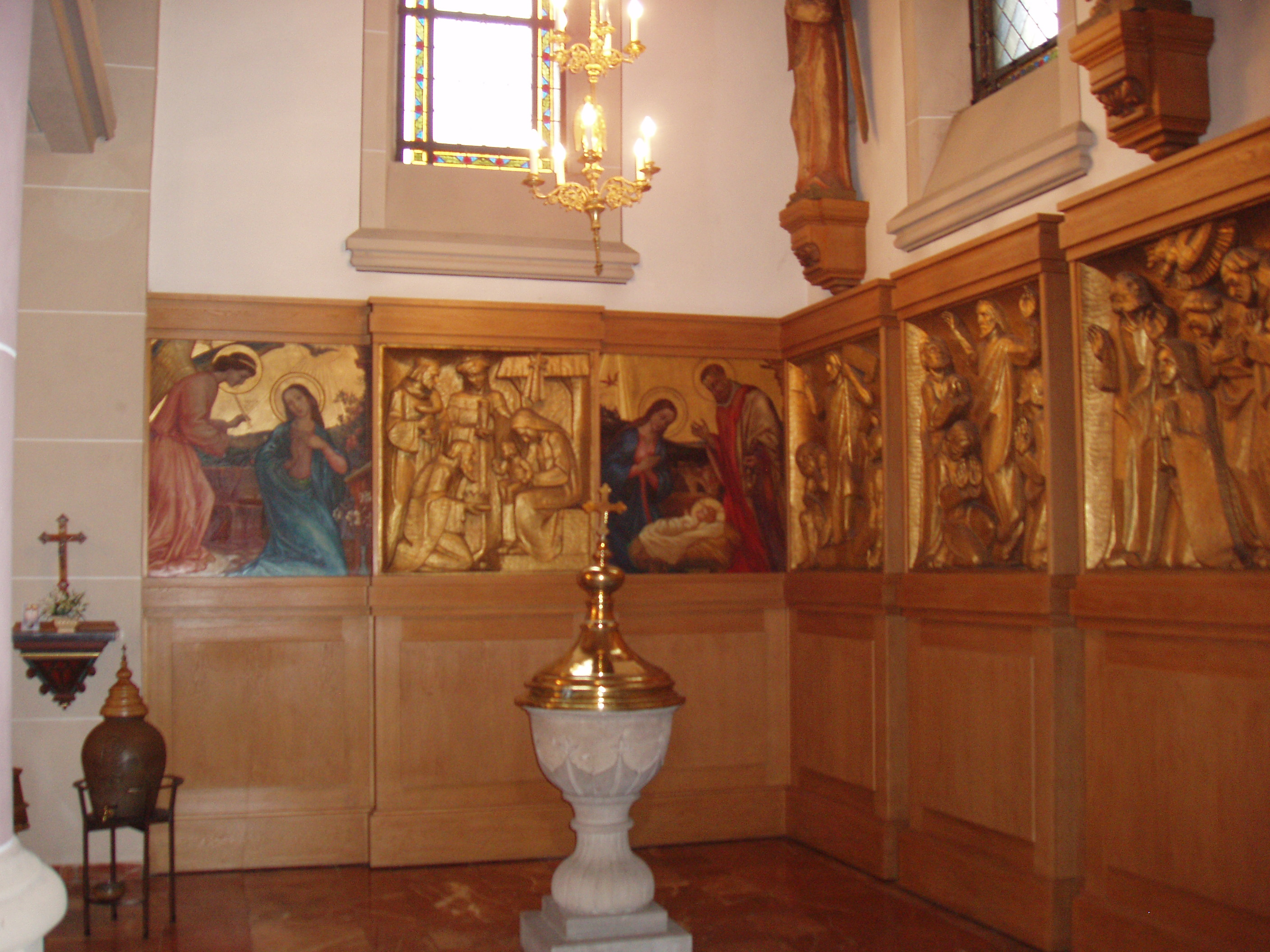 Taufkapelle der St.-Barbara-Kirche in Langenfeld-Reusrath